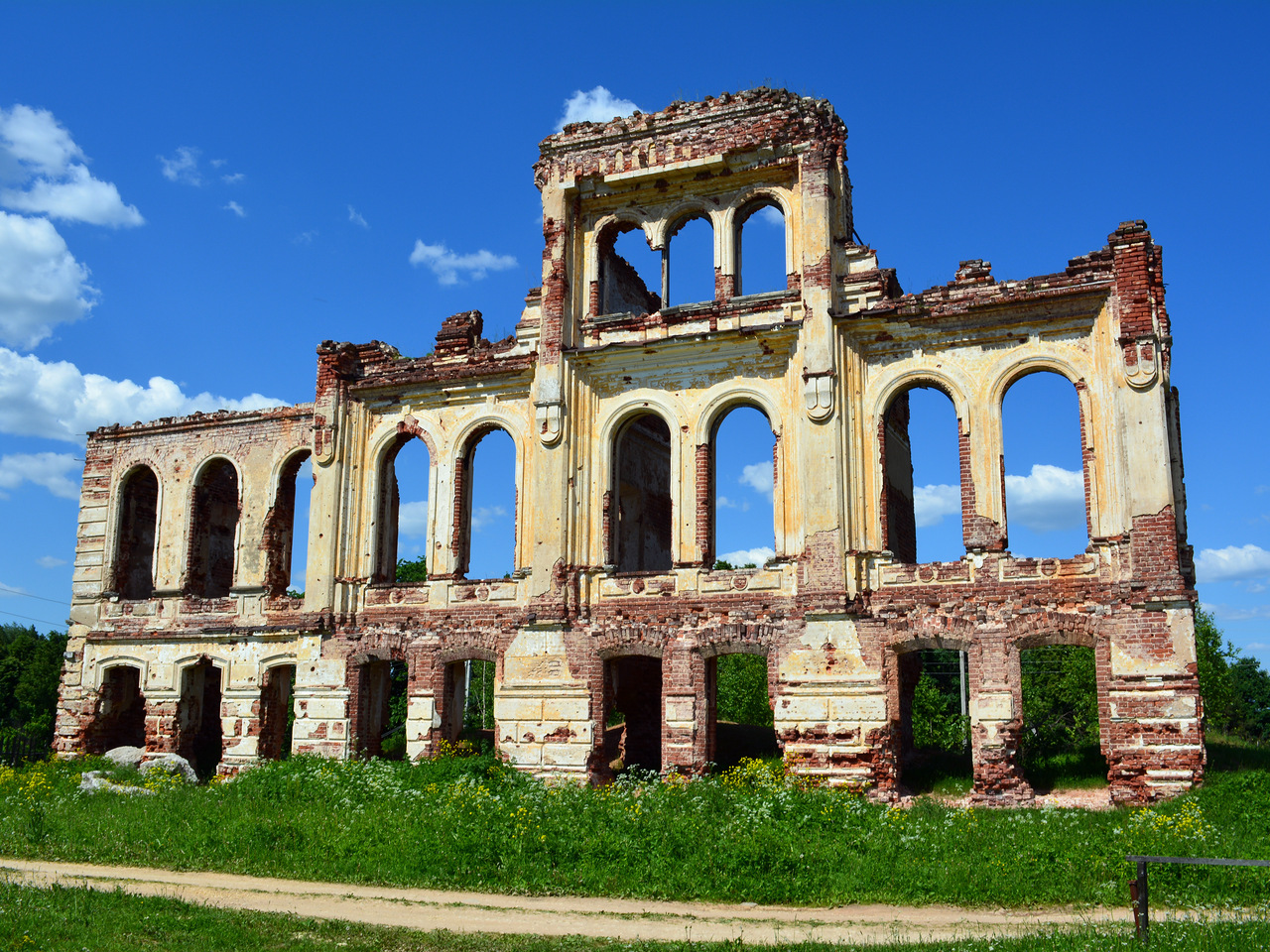 Усадьба генерала Петра Петровича Есипова «Знаменское» (Ржевский район, село Знаменское)